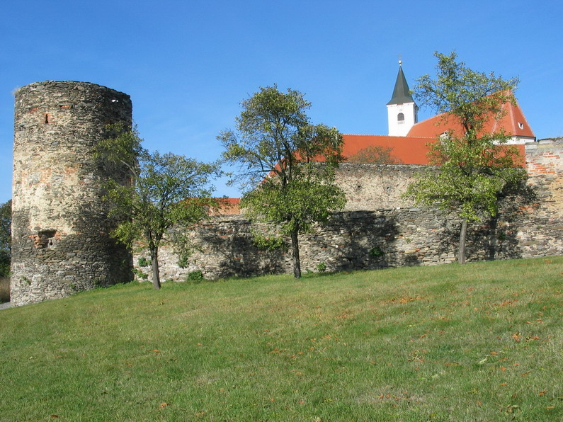 Kloster Pernegg in Niederoesterreich